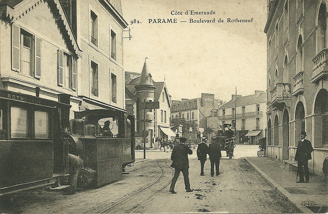 Carte postale ancienne éditée par ELD, collection Côte d'émeraude, n°982 PARAME - Boulevard de Rothéneuf. Départ de Paramé du Tramway pour Rothéneuf